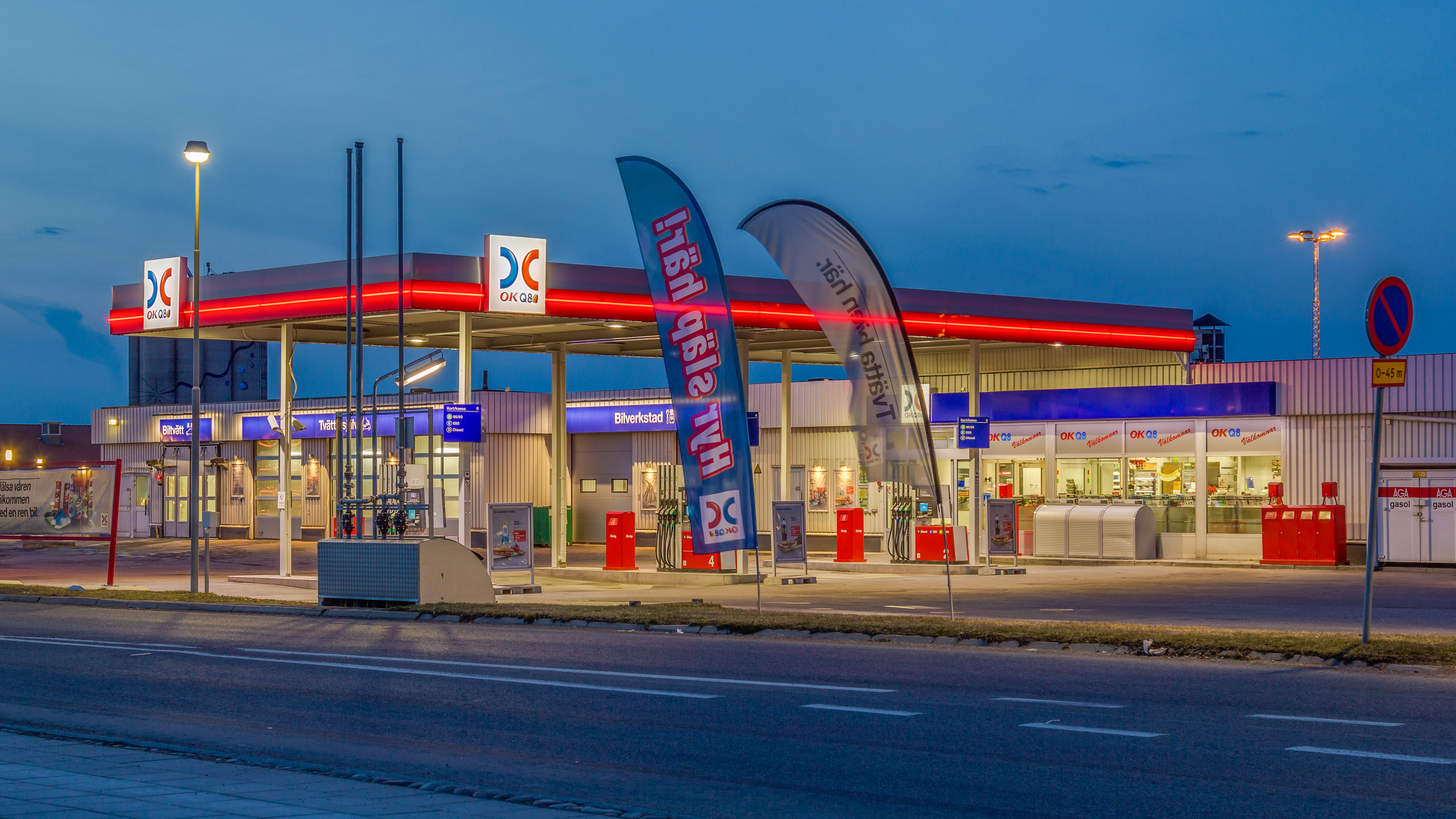 Bensinstationen OKQ8 (f.d. OK) i Gussarvet, Hedemora, Dalarnas län, Sverige. Tonmappad av tre exponeringar.